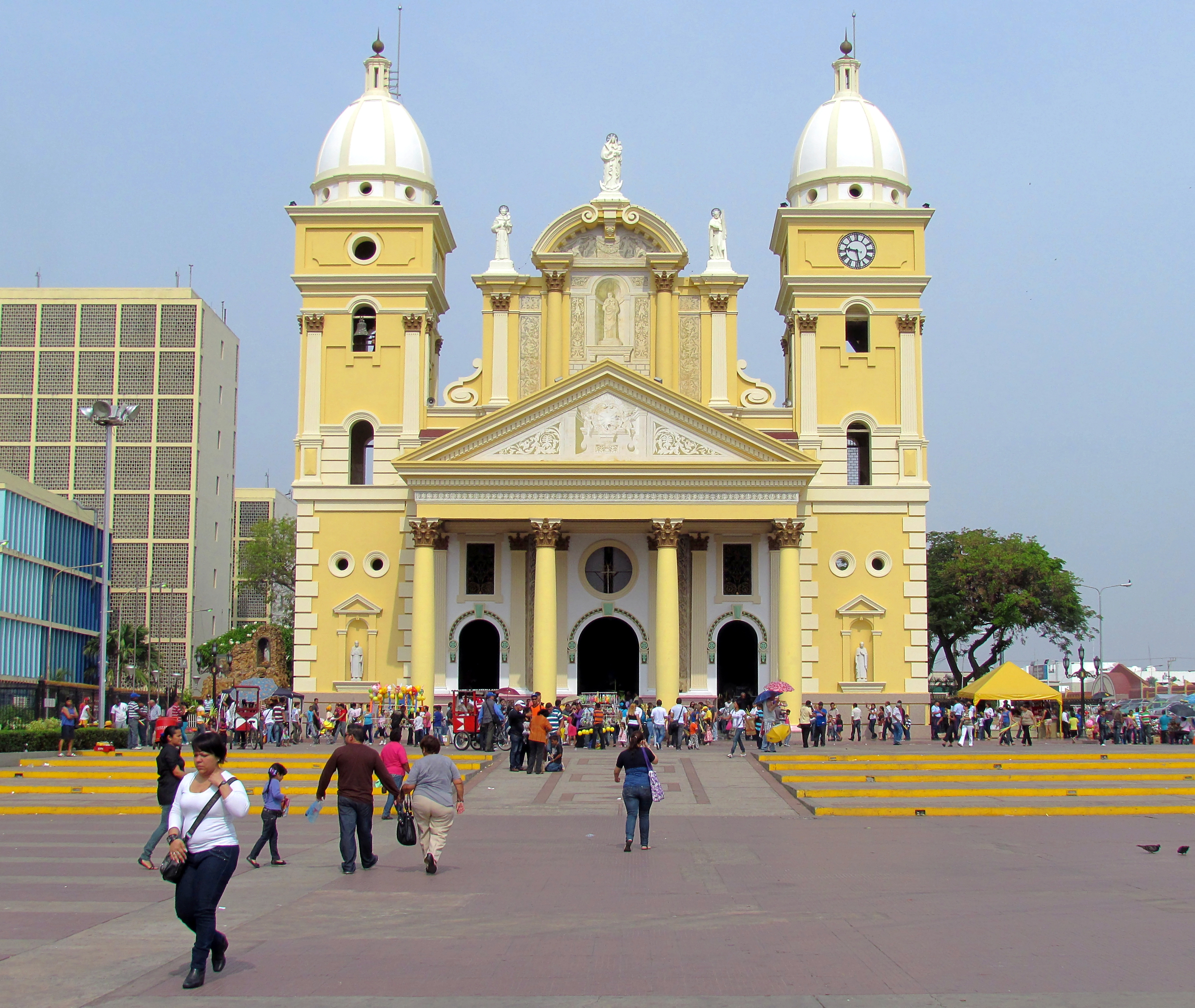 Basílica de la Chiquinquira